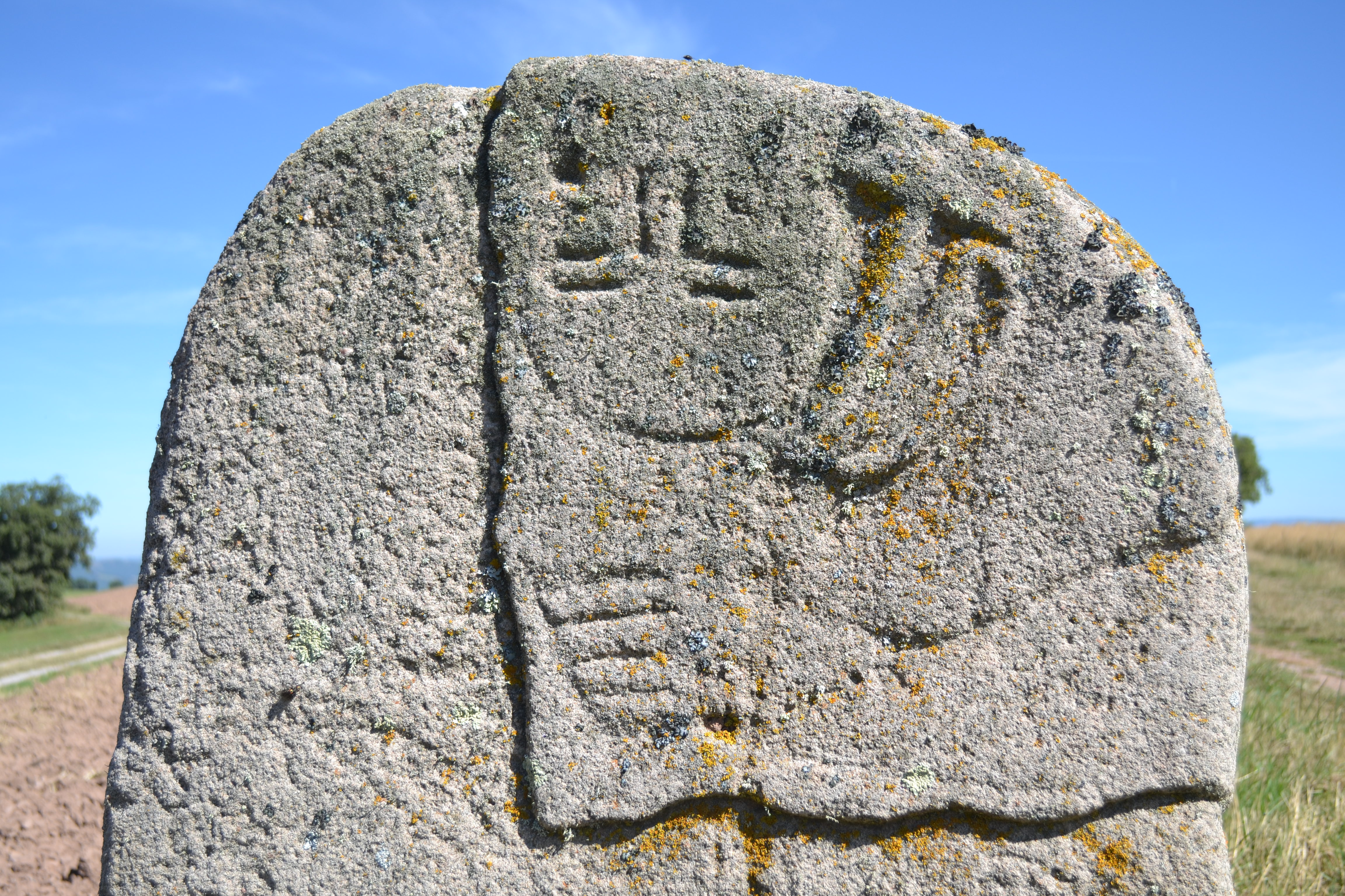 Statue-menhir du Plo de Mas Viel, Mounès-Prohencoux, Aveyron.